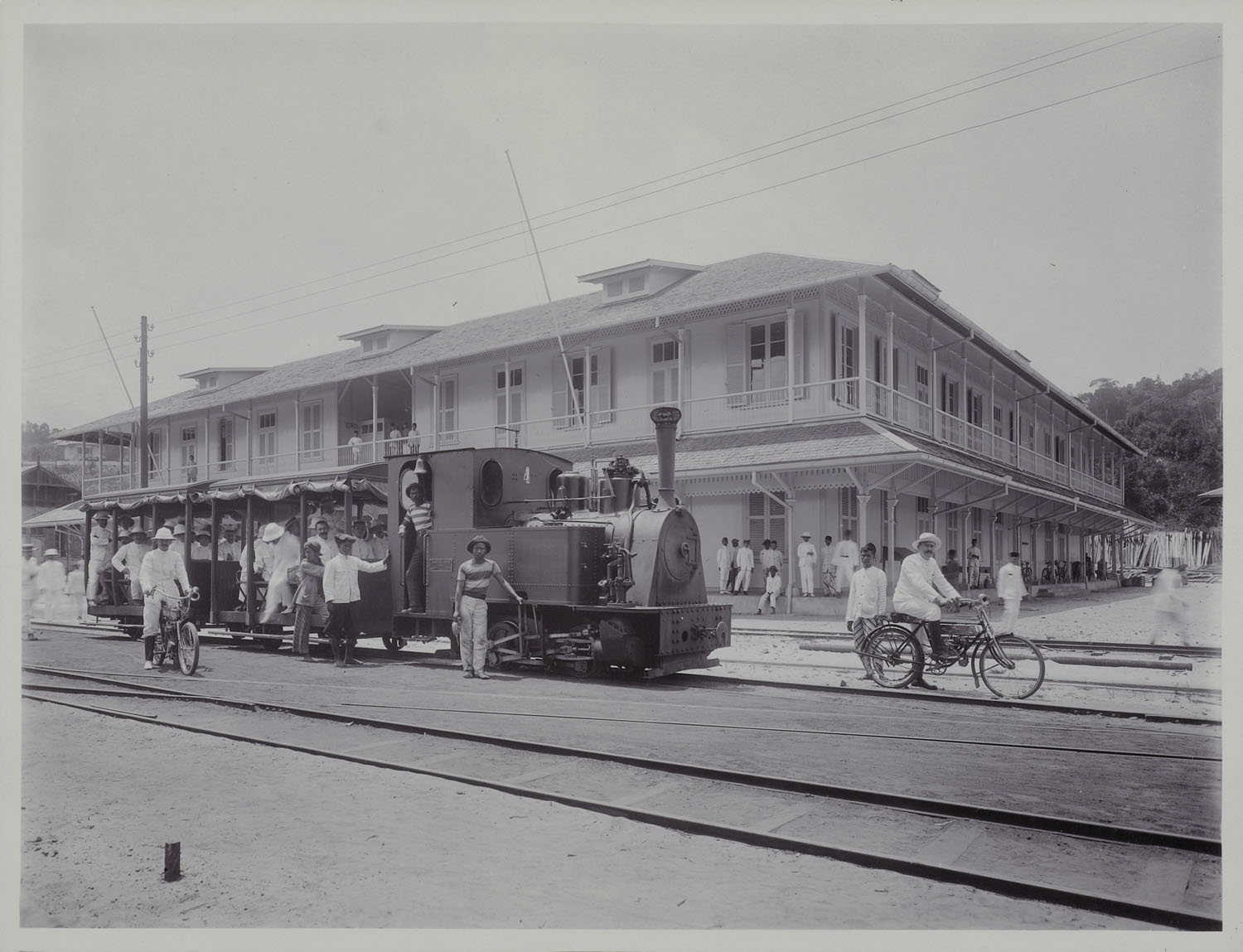 Sebuah trem SJS yang melayani trem lintas Semarang.